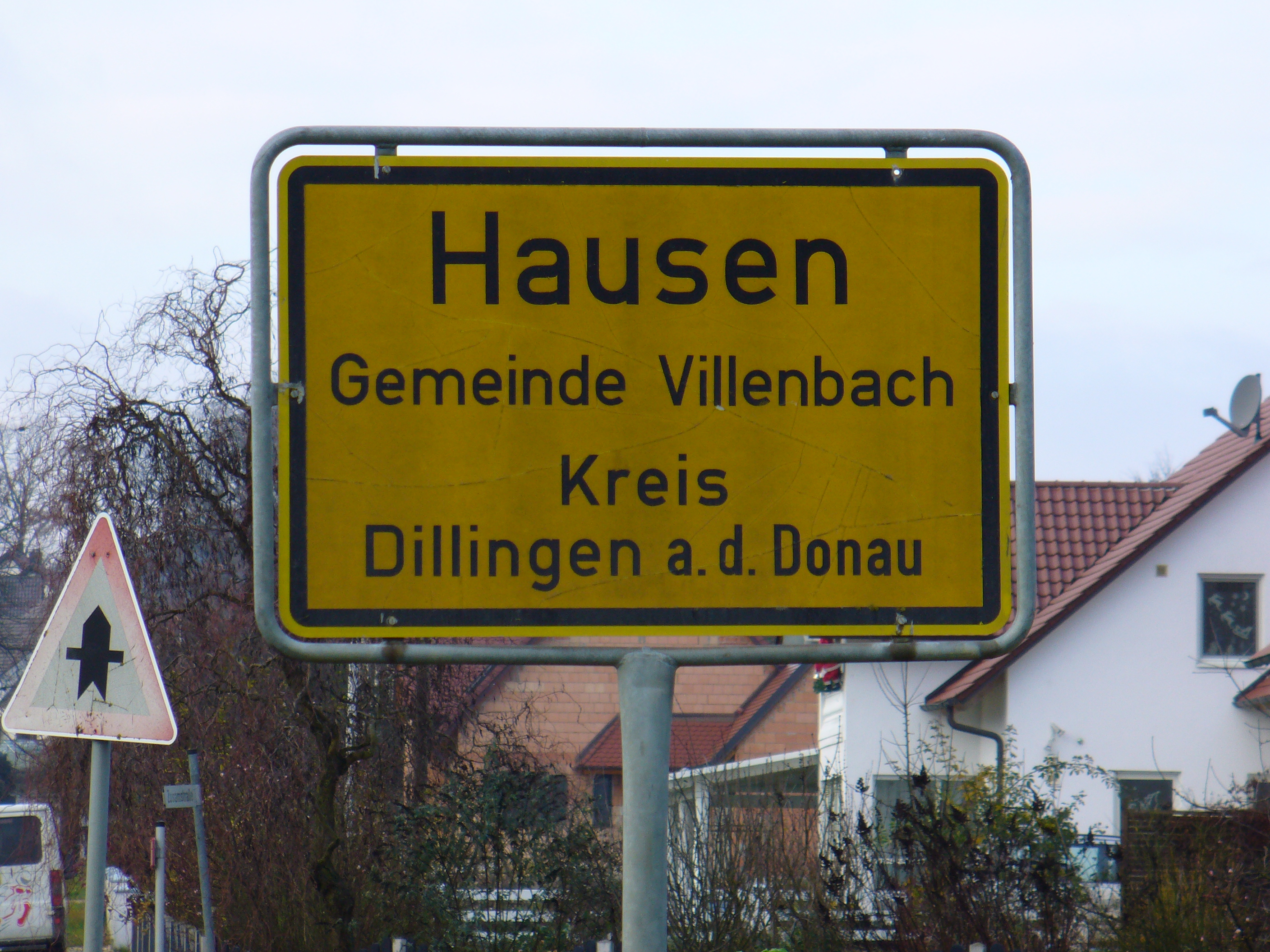 Ortsschild Hausen